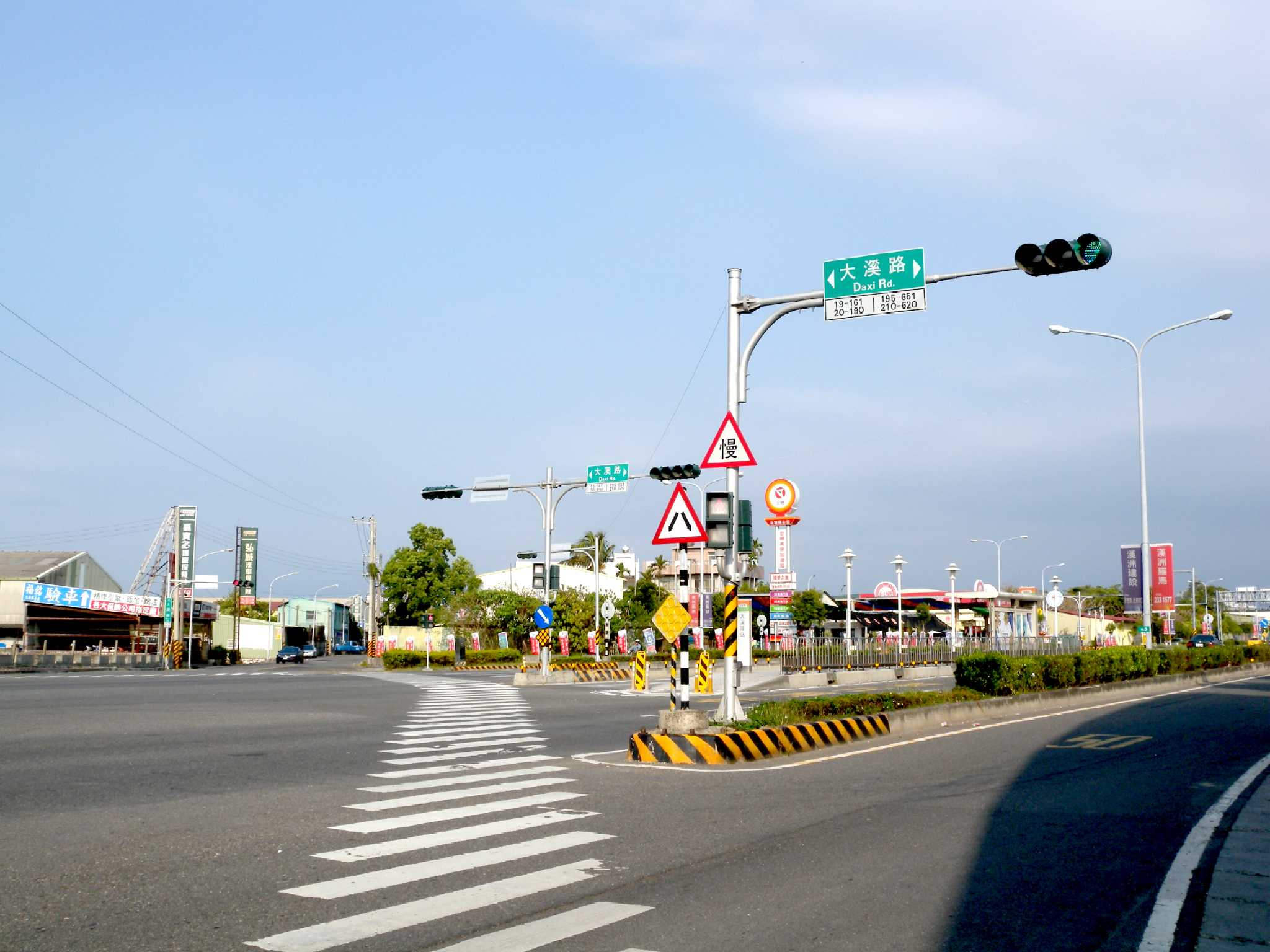 嘉義高鐵ＢＲＴ公車大溪厝站